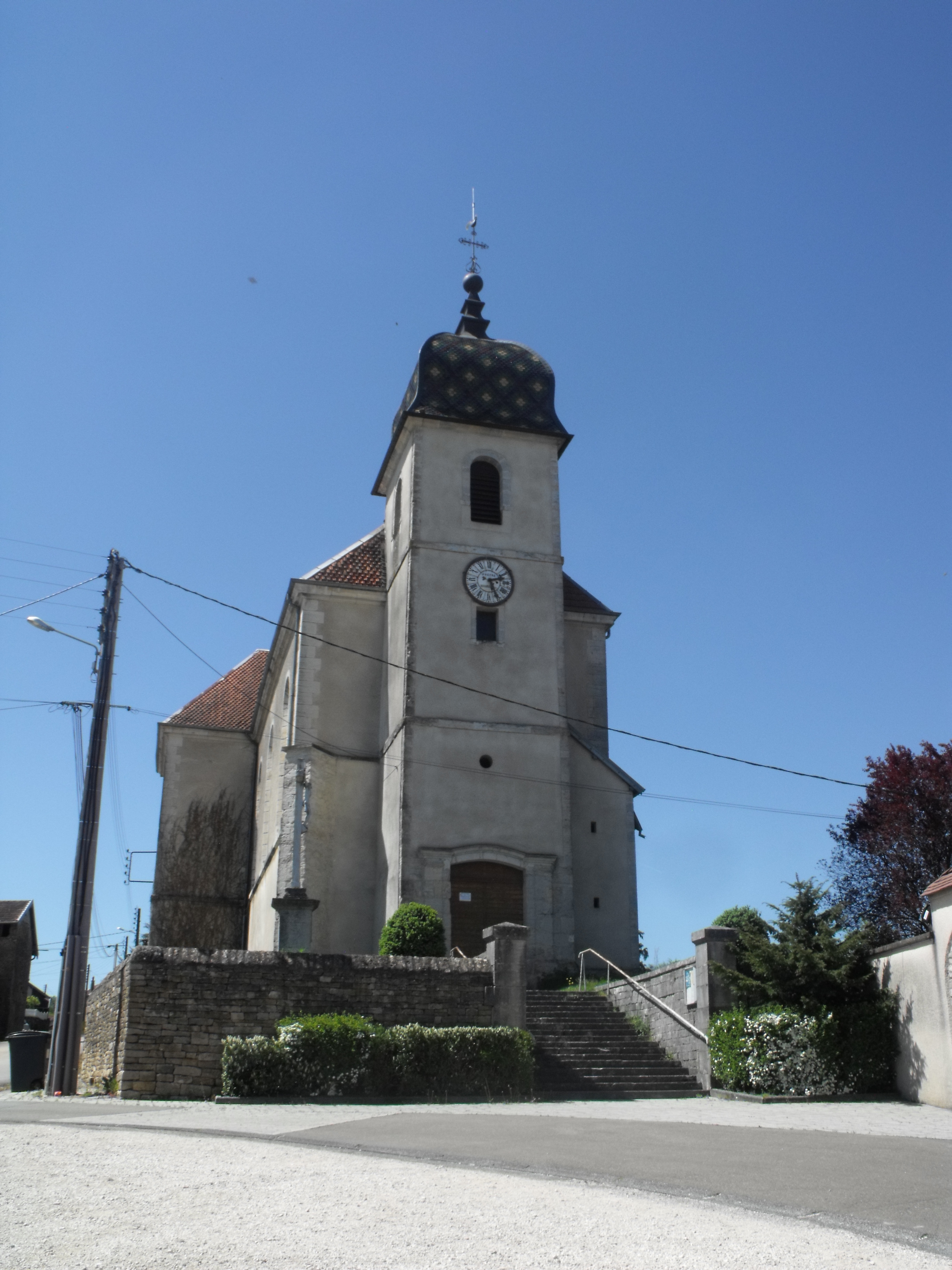 Eglise de Lavernay, Doubs, France